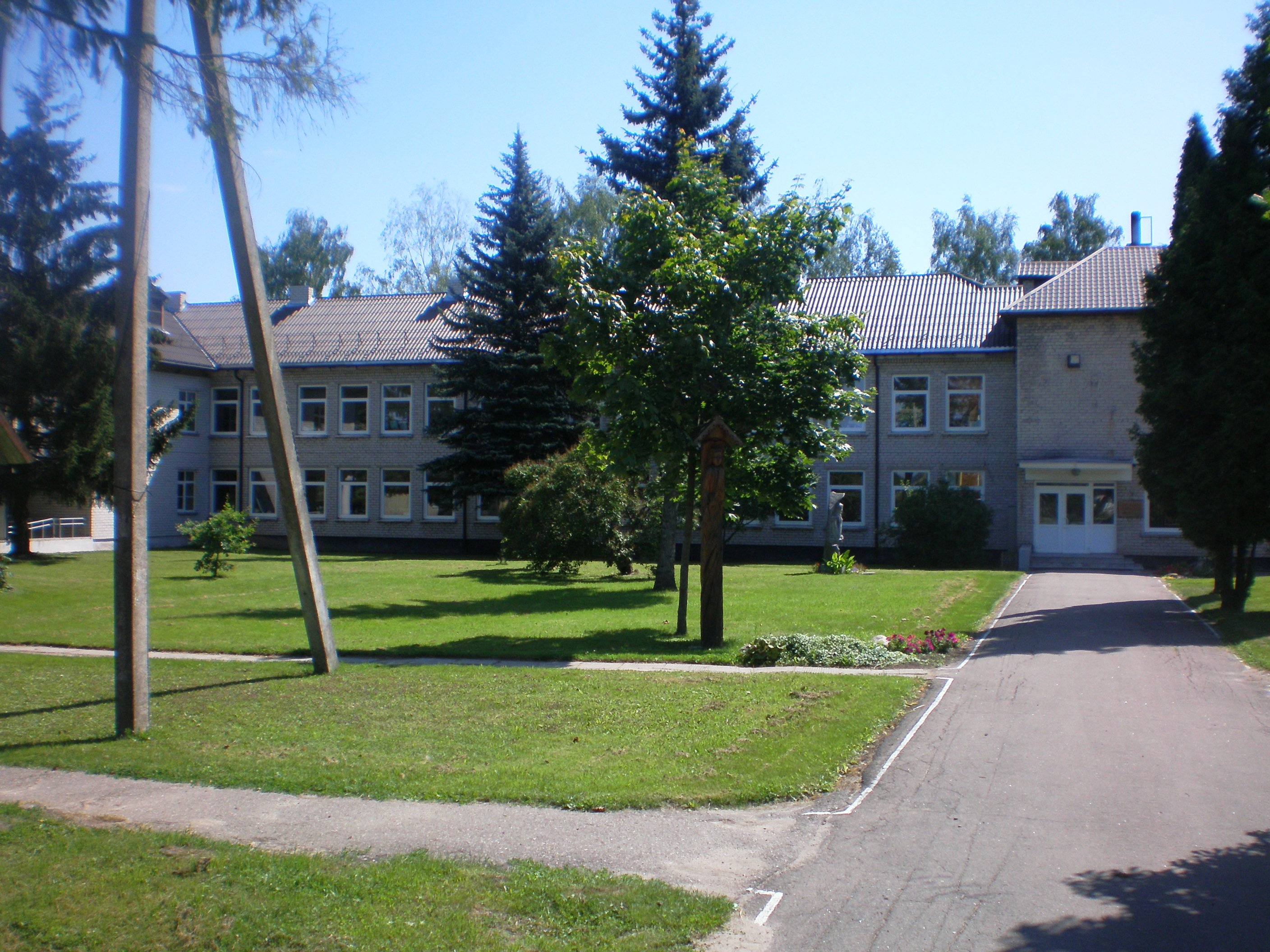 M. Katkus school in Surviliškis